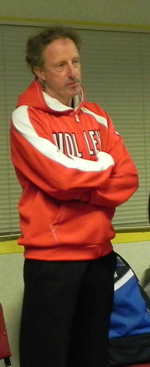 Photo de Guy Di Giantommaso